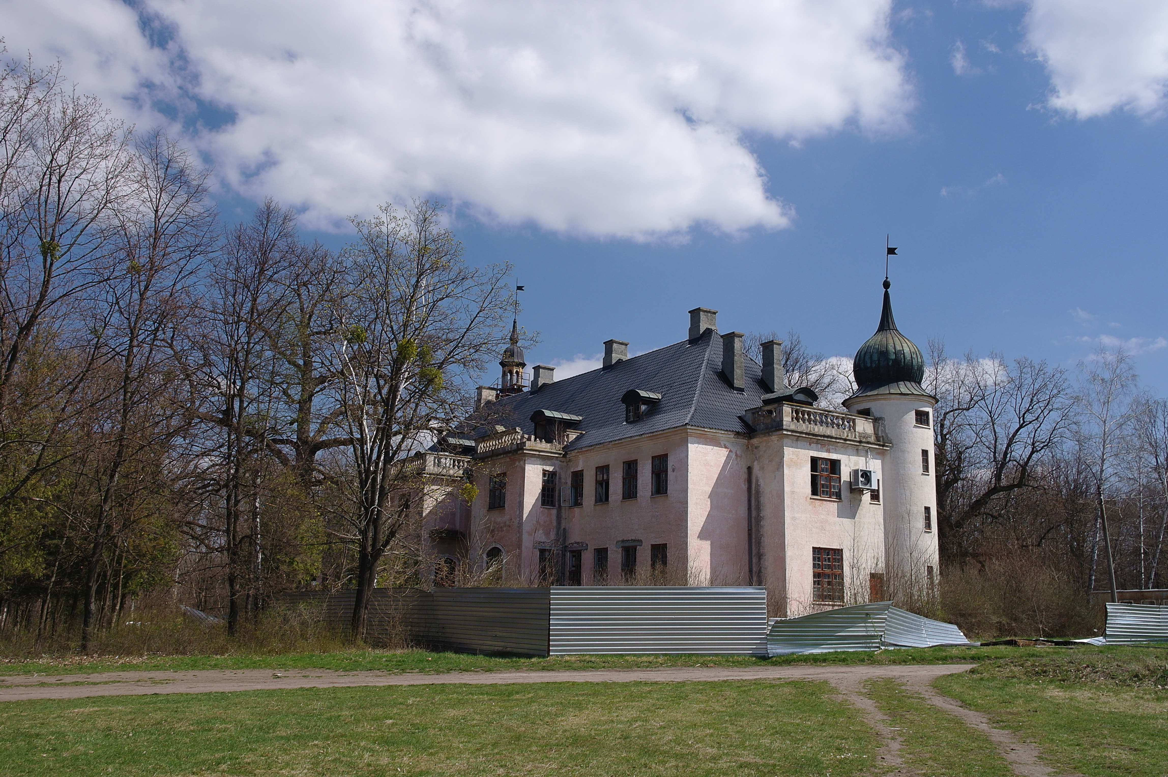 Мисливський замок Шувалова у стилі французського неоренесансу (1896-1903 рр.)